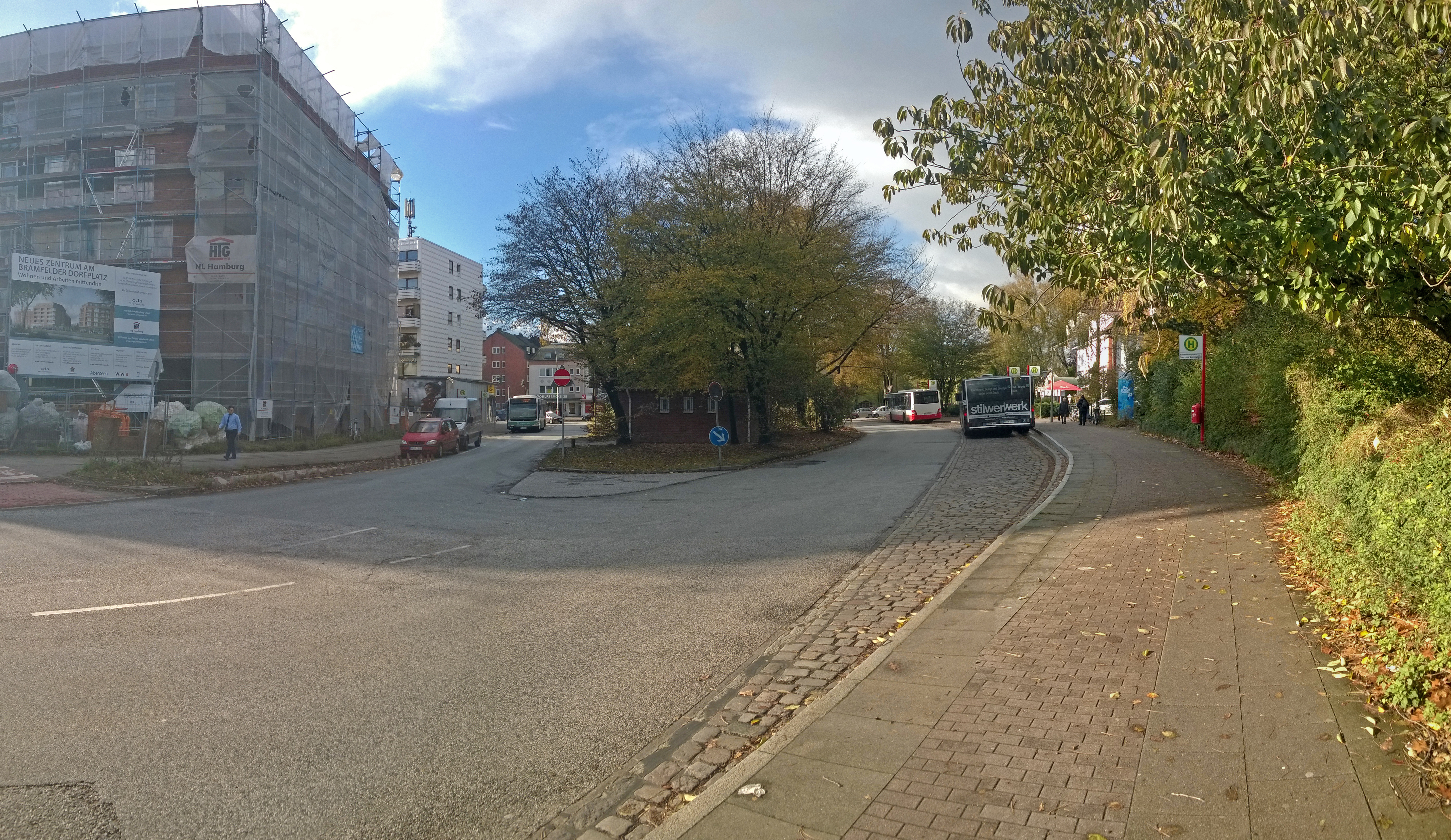 Panorama des Bramfelder Dortplatzes 2017